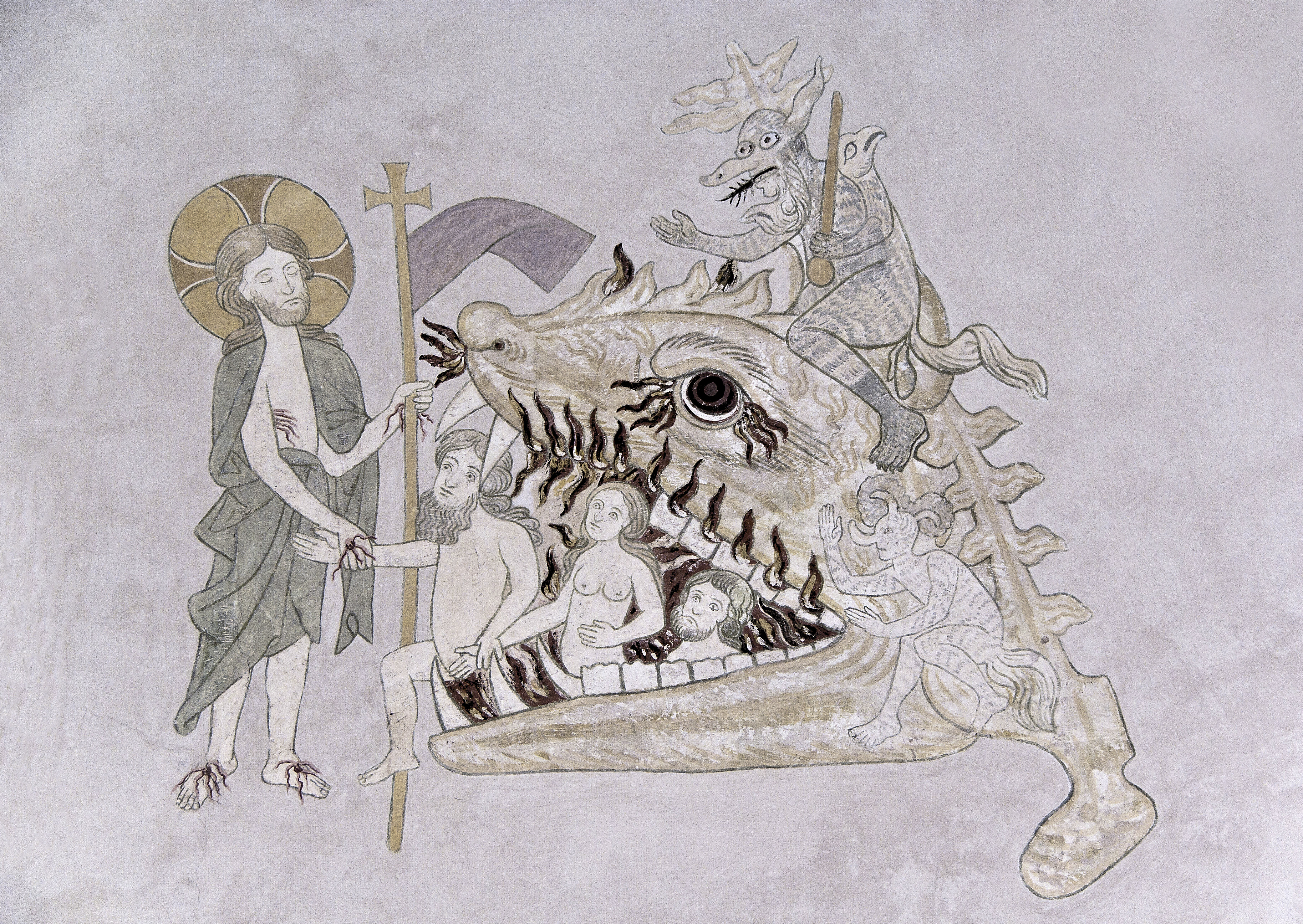 Gewölbemalerei im Schiff (Detail) – Höhlenfahrt